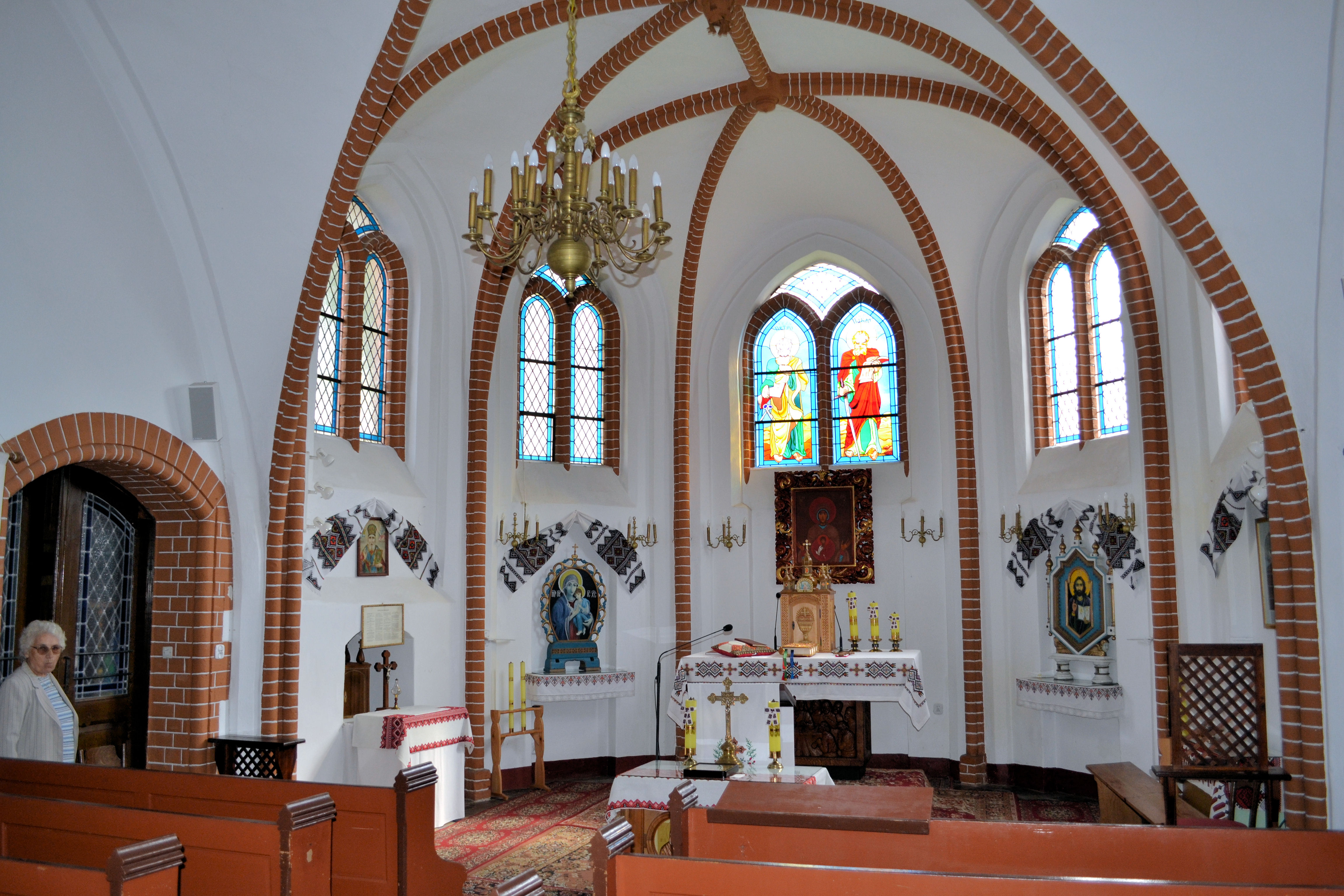 Trzebiatów, ul.II Pułku Ułanów 26 - dawna kaplica św. Gertrudy, obecnie cerkiew pw. św. ap. Piotra i Pawła